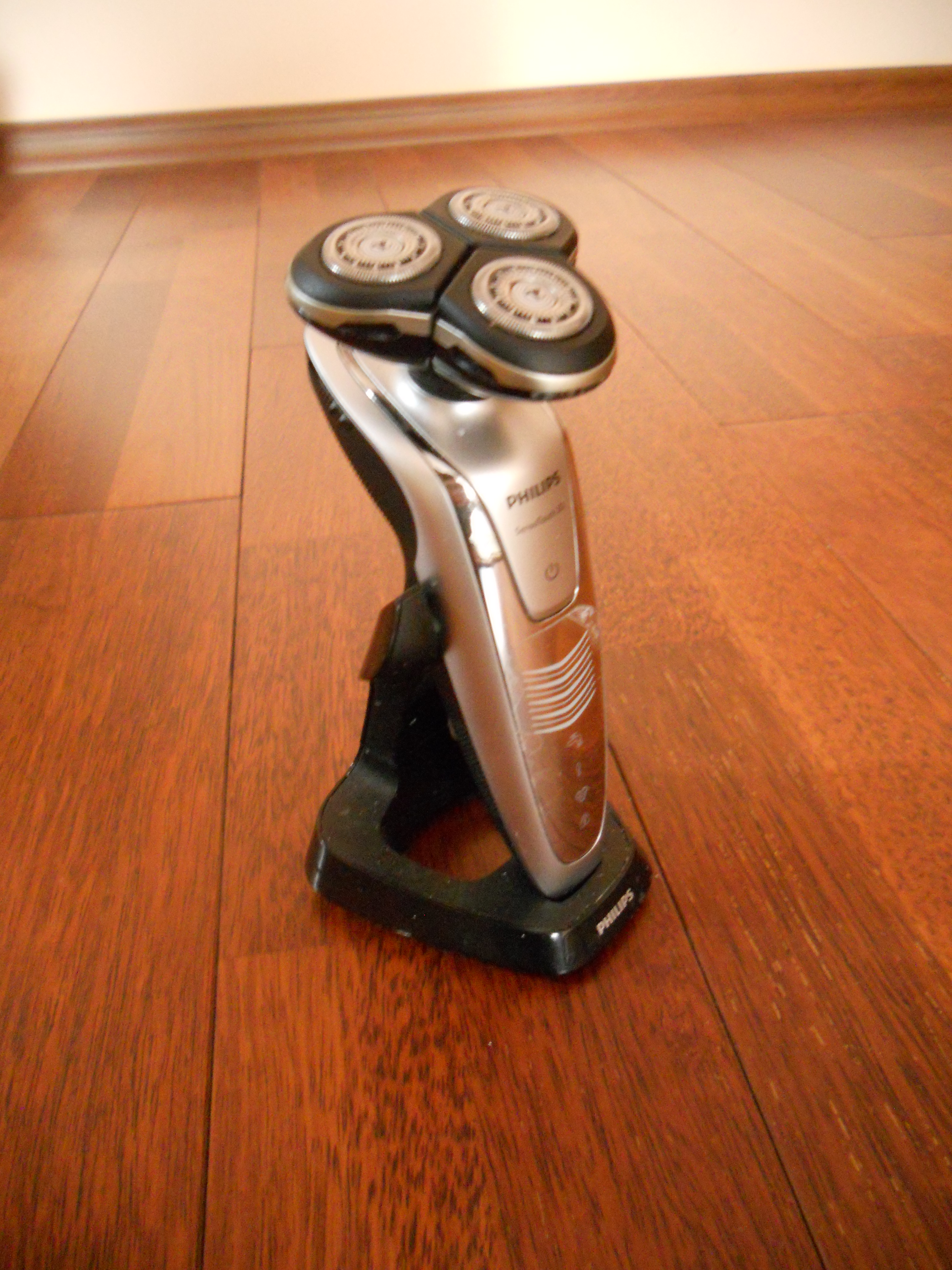 Golarka Elektryczna Philipsa